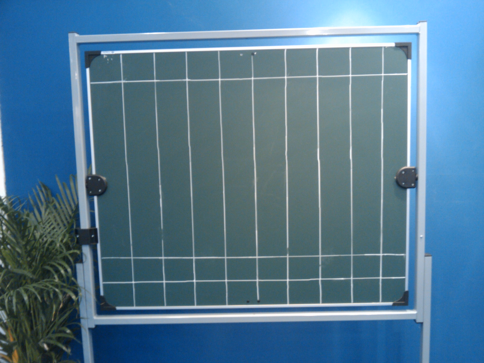 Tableau XYZ de City Hunter exposé à la Japan Expo 2010